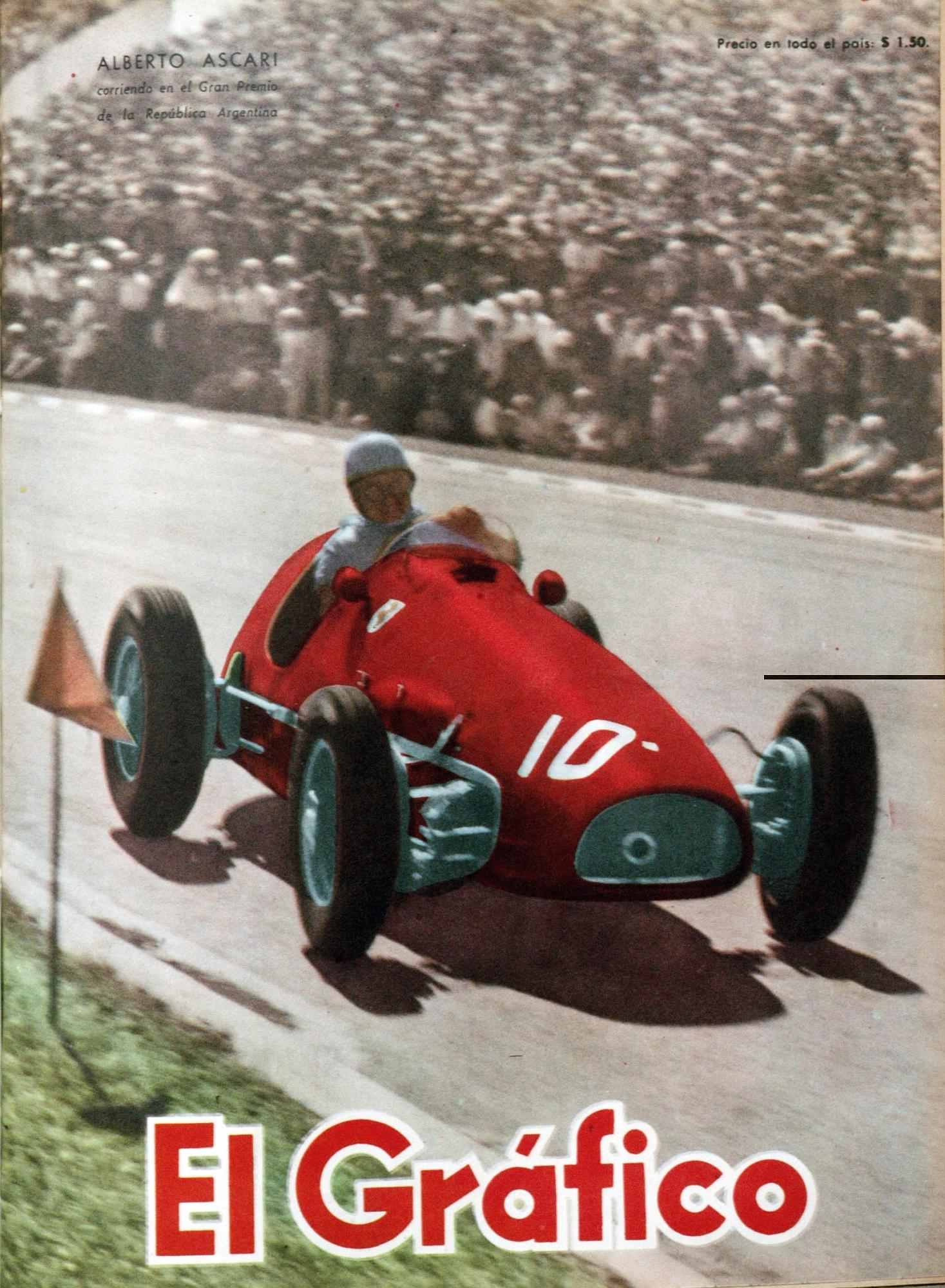 El Grafico del 30 de Enero de 1953. Edicion 1747